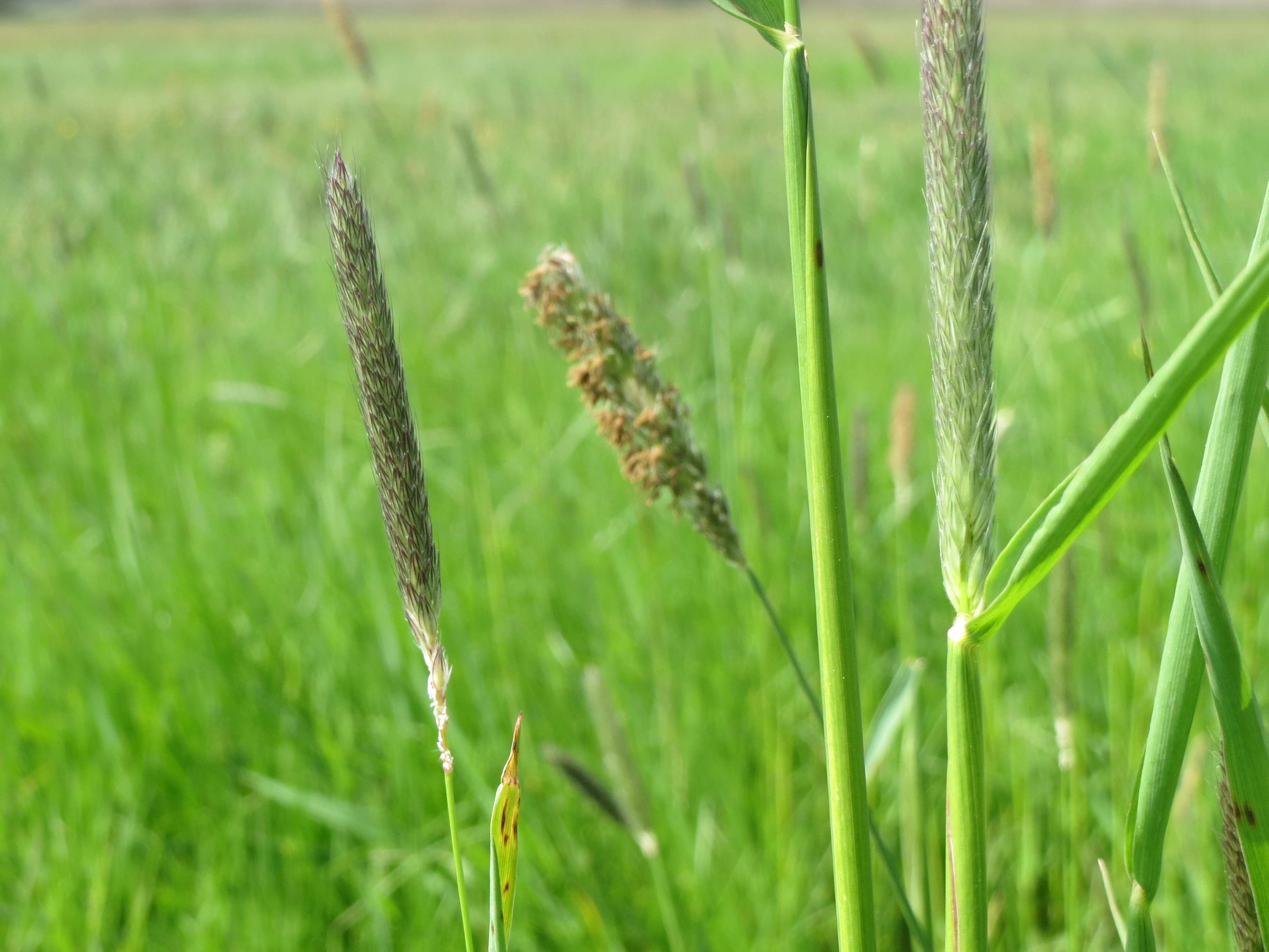 Wiesen-Fuchsschwanz (Alopecurus pratensis) im Hockenheimer Rheinbogen